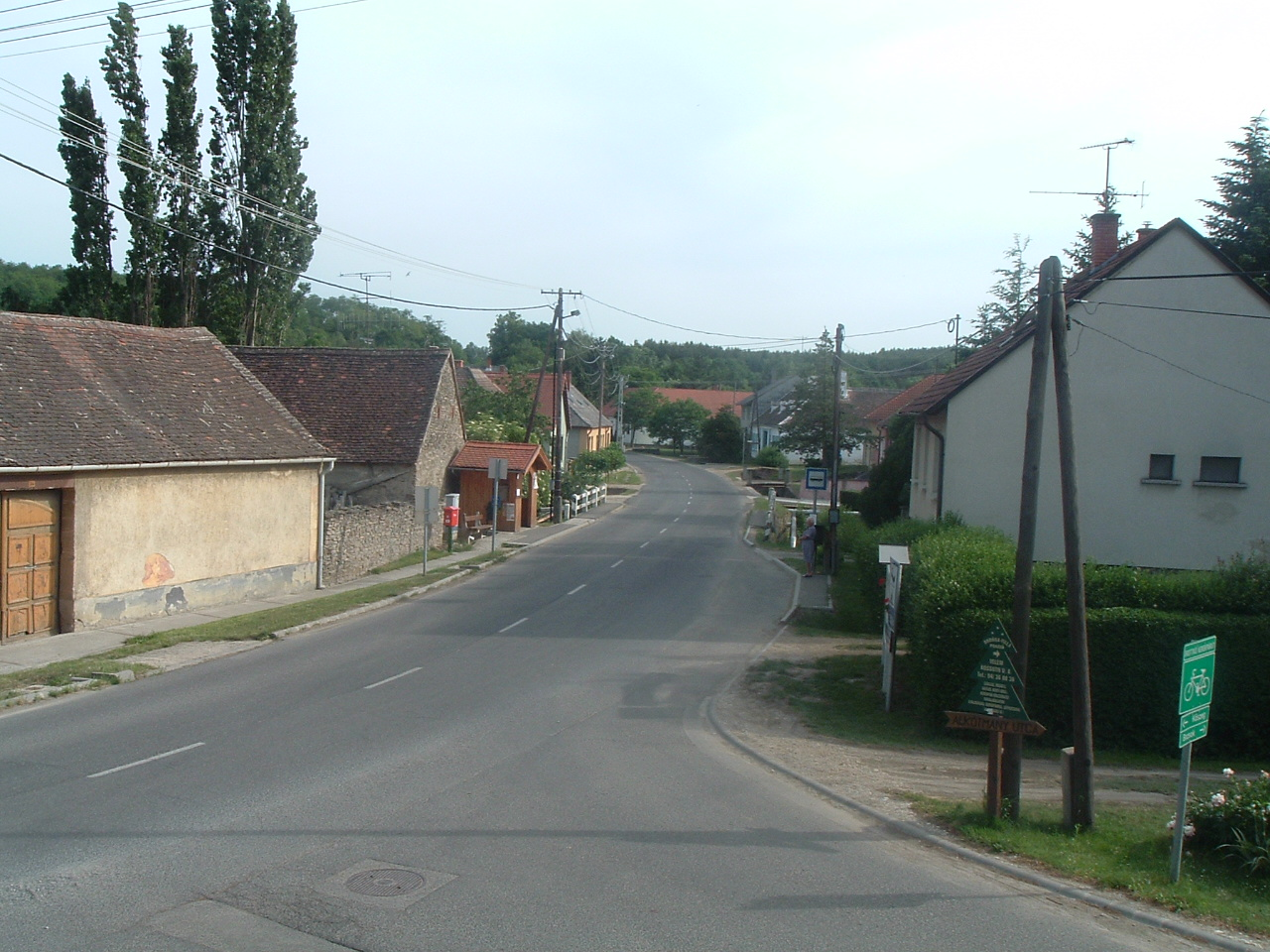 Kőszegszerdahely, Hungary